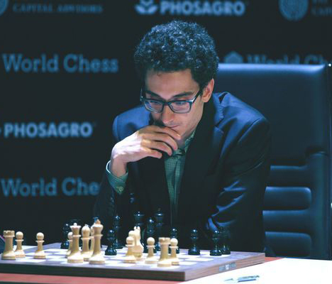 Фабиано Каруана, Турнир Претендентов 2018